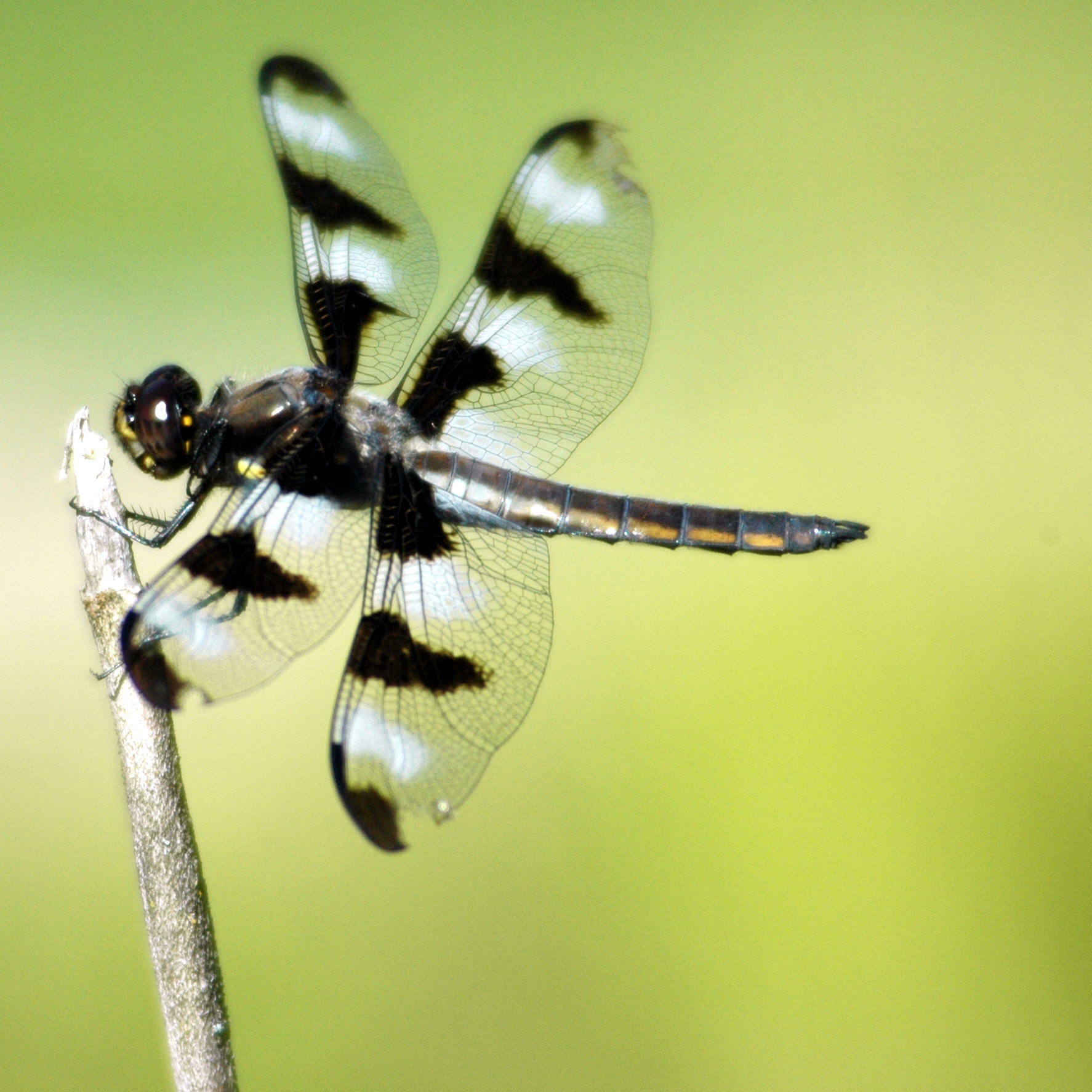 Twelve-spotted Skimmer, Libellula pulchella (male), perching